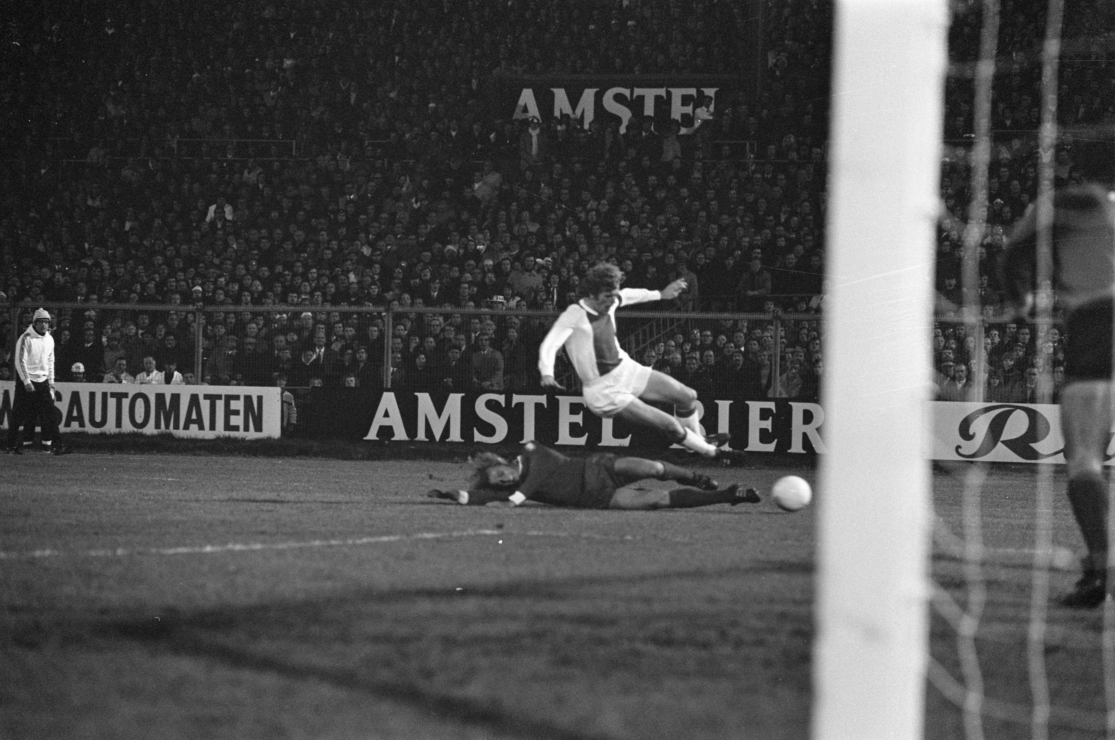 Collectie / Archief : Fotocollectie Anefo Reportage / Serie : [ onbekend ] Beschrijving : Ajax tegen Benfica 1-0, halve finale Europacup I ; Keizer in duel met Artur (liggend) Datum : 5 april 1972 Trefwoorden : sport, voetbal Instellingsnaam : Benfica Fotograaf : Mieremet, Rob / Anefo Auteursrechthebbende : Nationaal Archief Materiaalsoort : Negatief (zwart/wit) Nummer archiefinventaris : bekijk toegang 2.24.01.05 Bestanddeelnummer : 925-5082